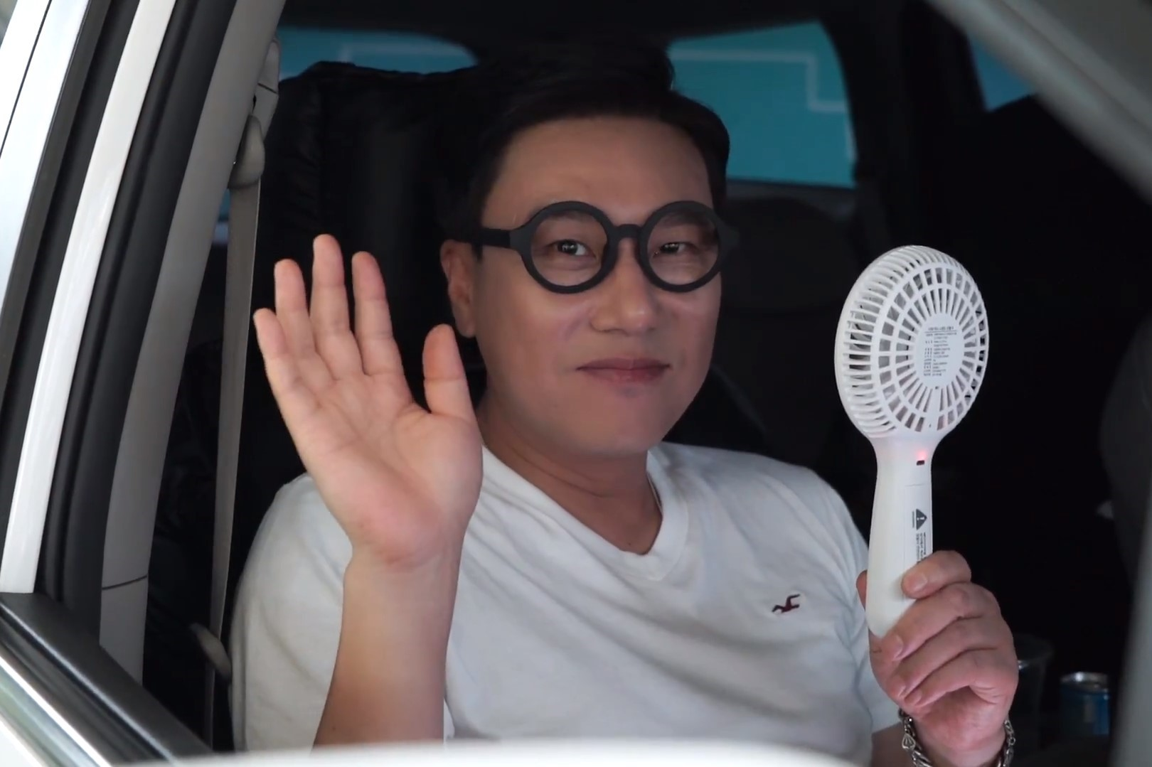 [이상민] 광고촬영 현장